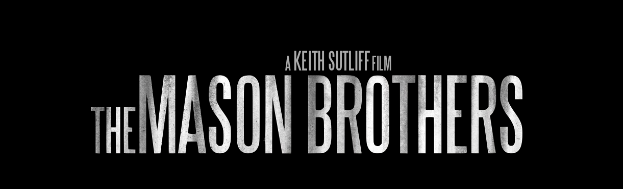 Logo-Titulo original de la película "The Mason Brothers"